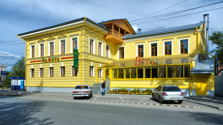 Жилой дом с мезонином (Томская область, Томск, гагарина улица, 2)